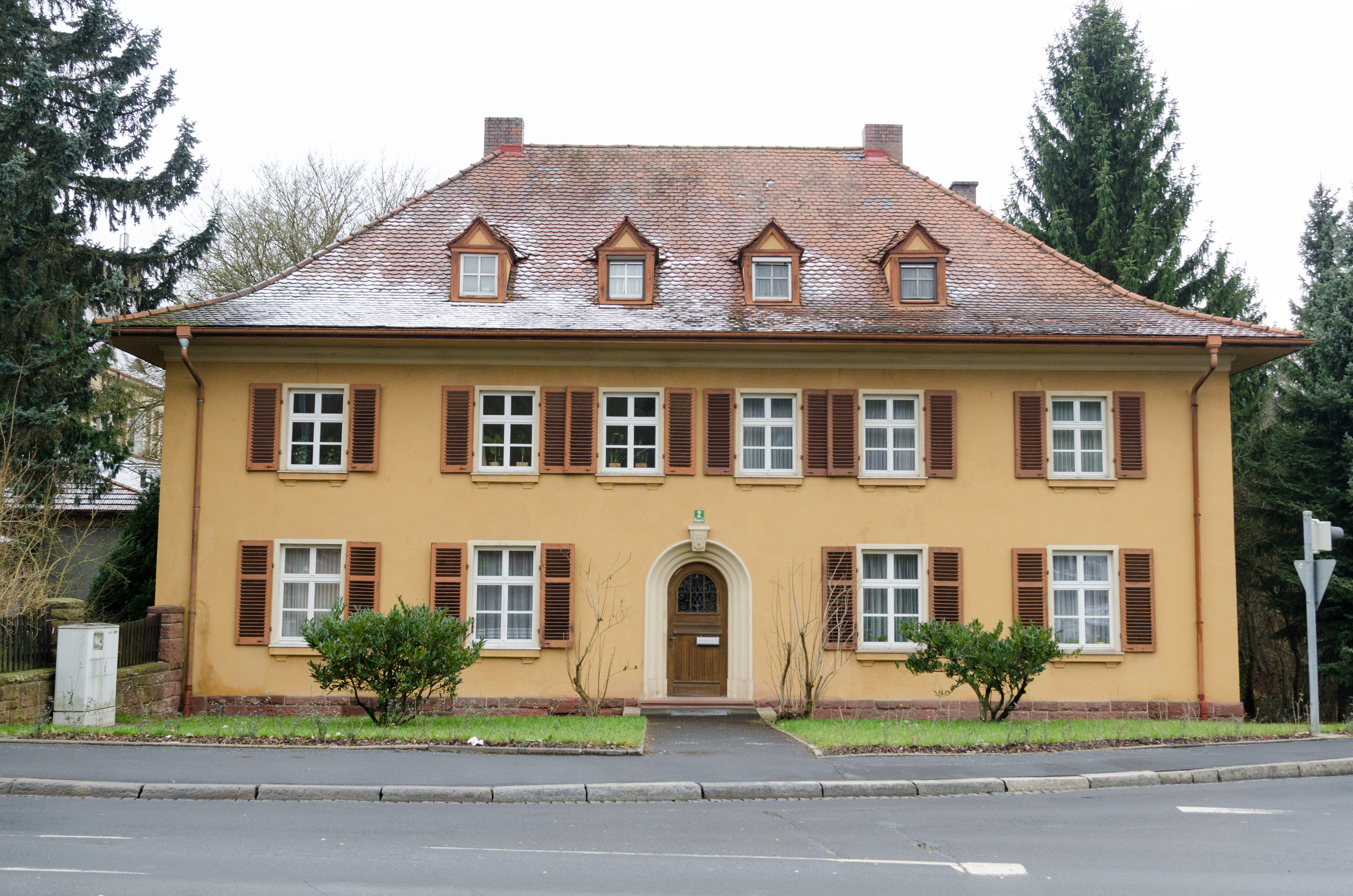 Bad Kissingen, Würzburger Straße 2